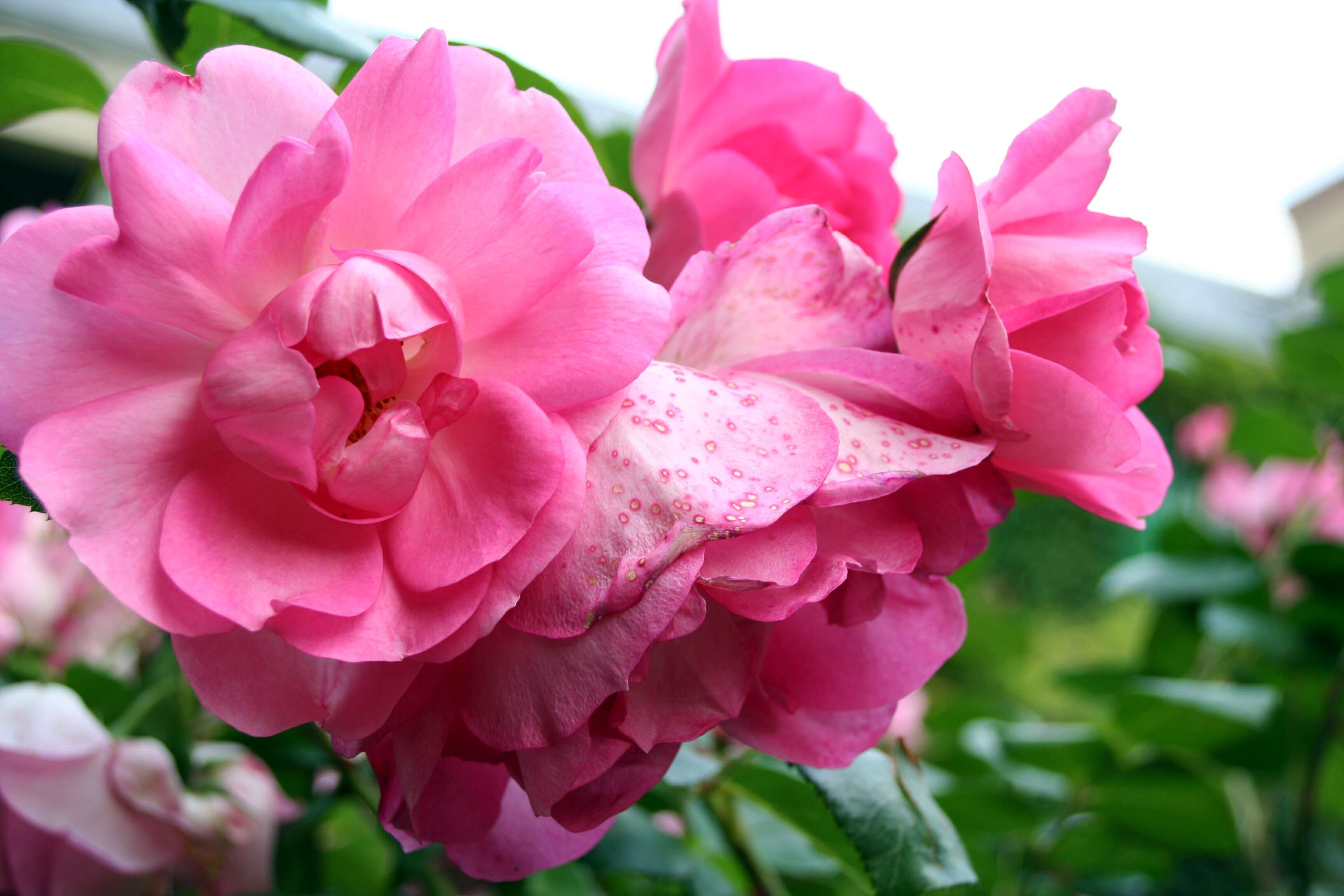 Rose 'Centenaire de Lourdes' photographiée dans le jardin de Claude Monet à Giverny - Eure (France)